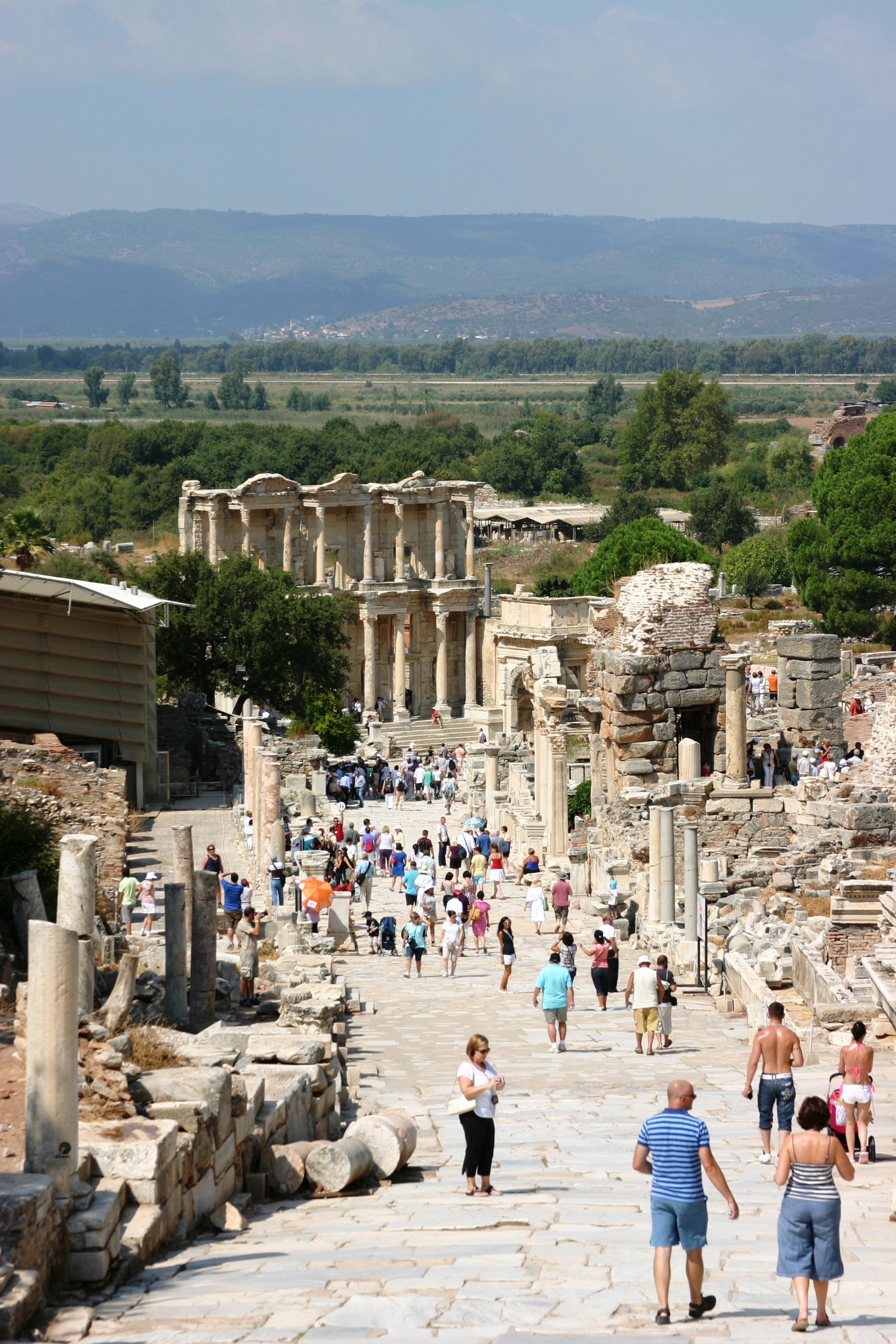 Rua Curetes em Éfeso.